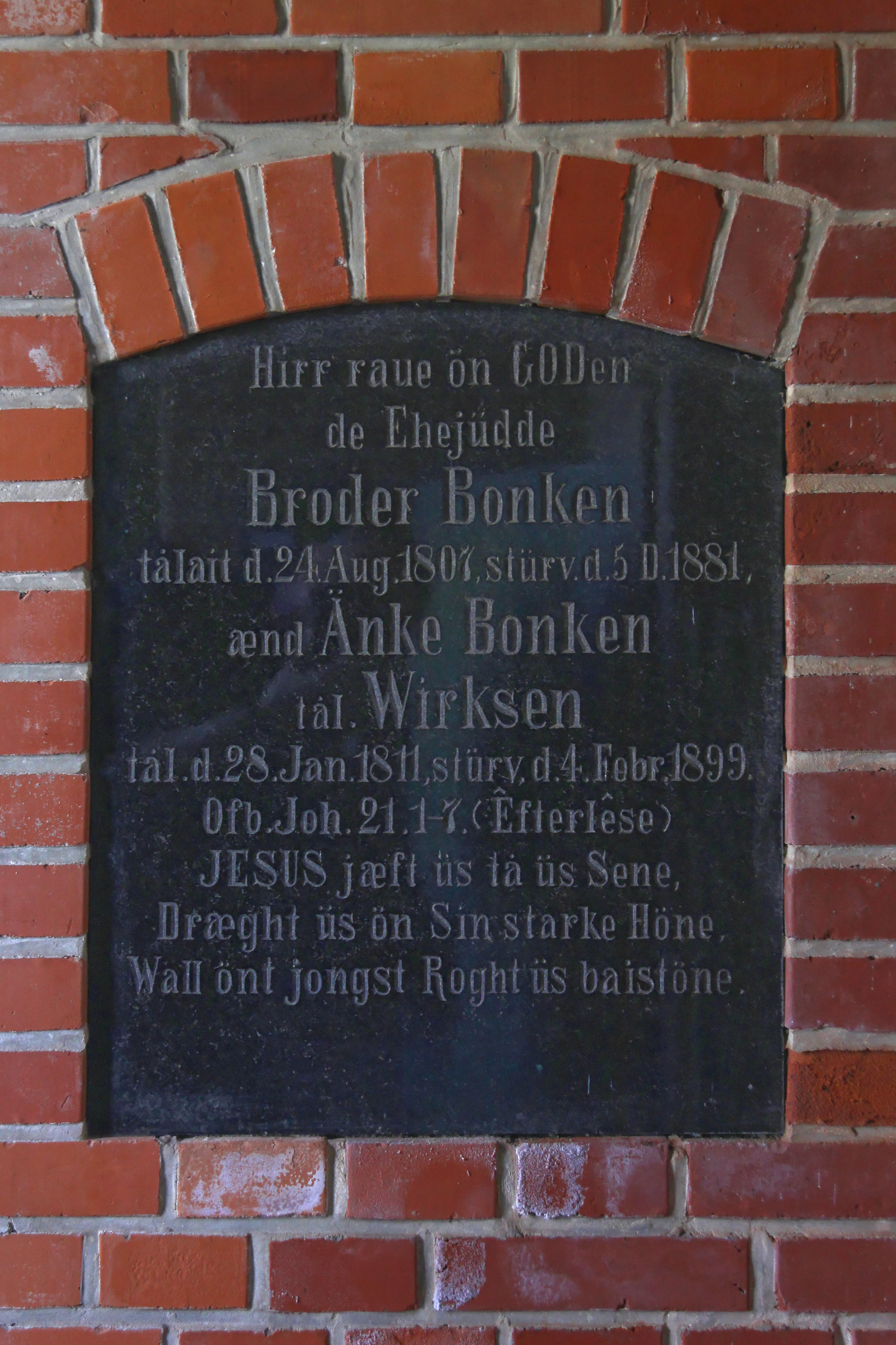 Hallig Langeneß, Kirche, Tafel in der Eingangshalle